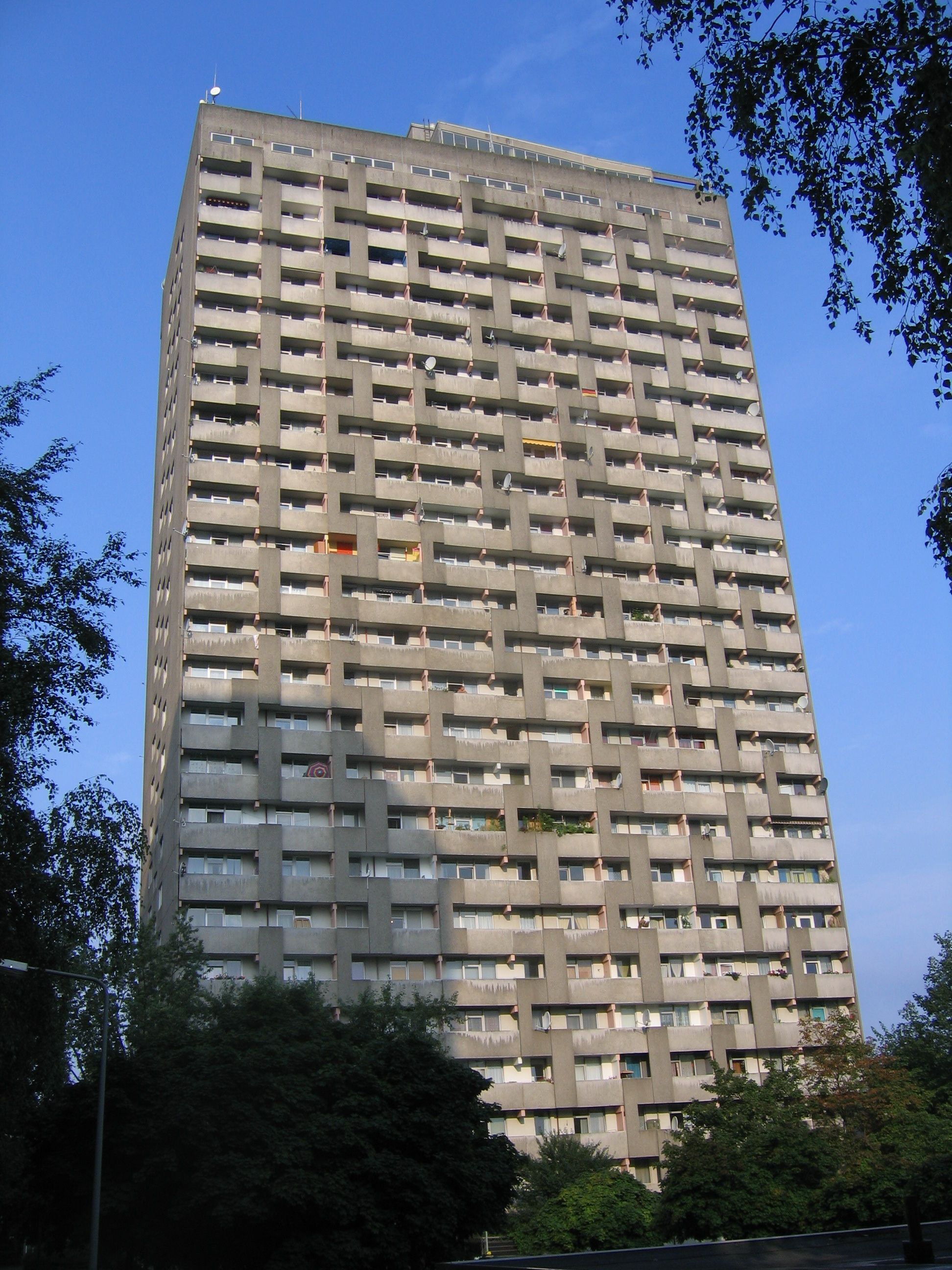 Hochhaus Frankfurter Berg, Julius-Brecht-Straße 3